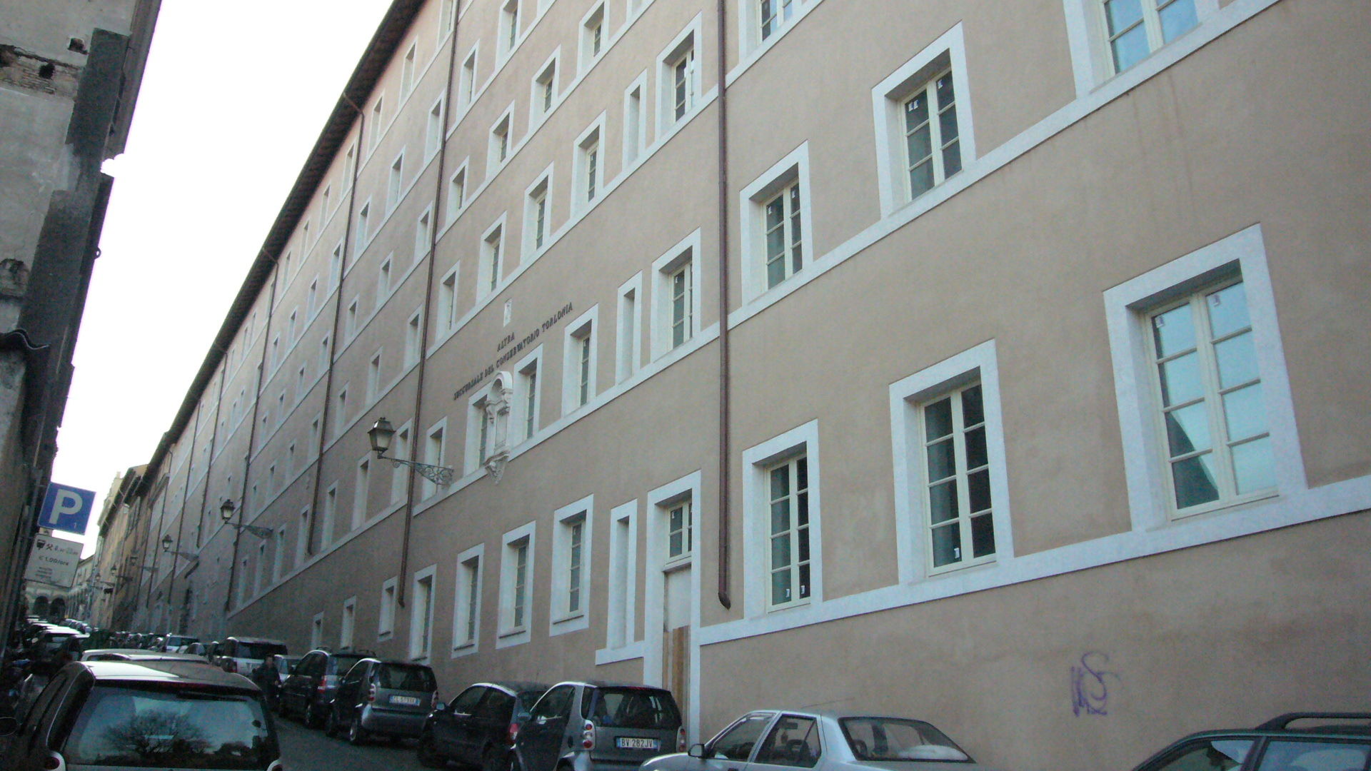 Roma, Conservatorio Torlonia alla salita di S. Onofrio